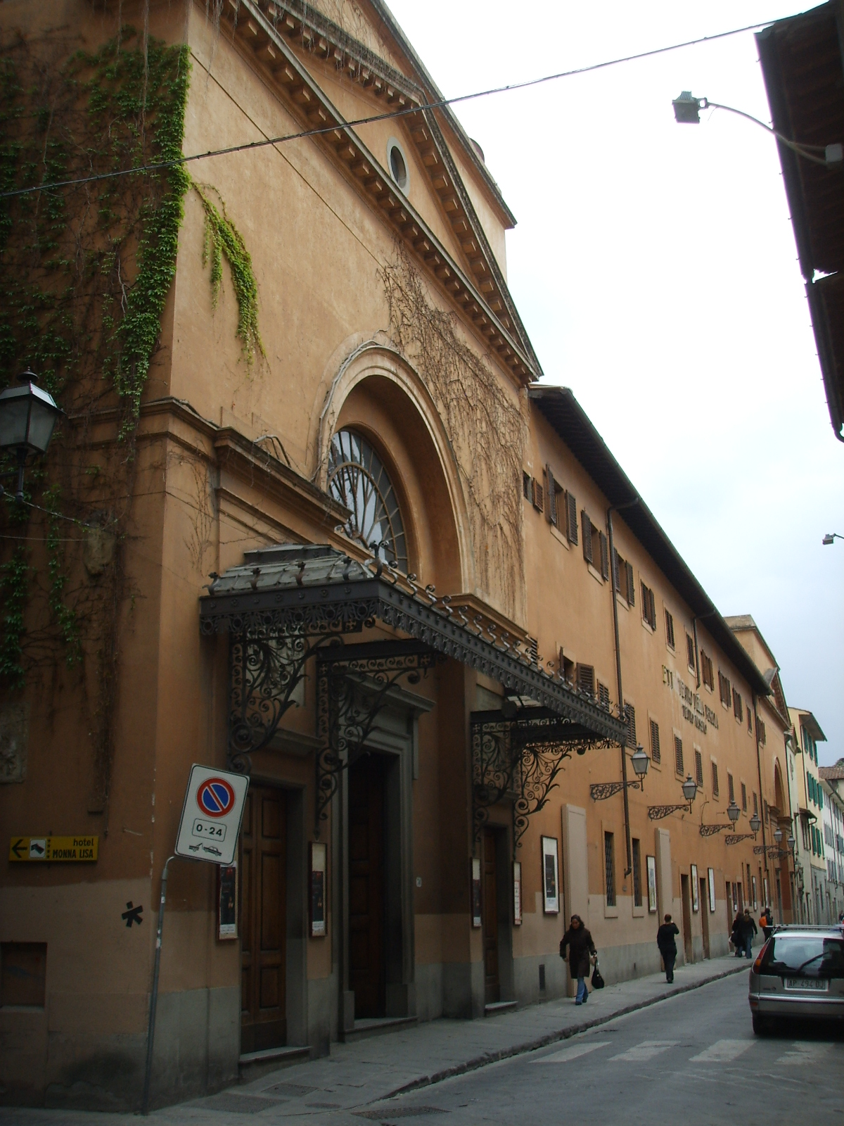 Teatro alla pegola